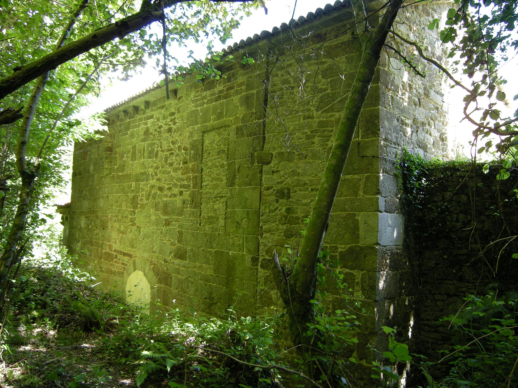 gl: Igrexa prerrománica de Santo Antolín de Toques